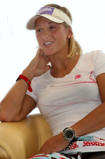 Michaela Kirchgasser in 2010